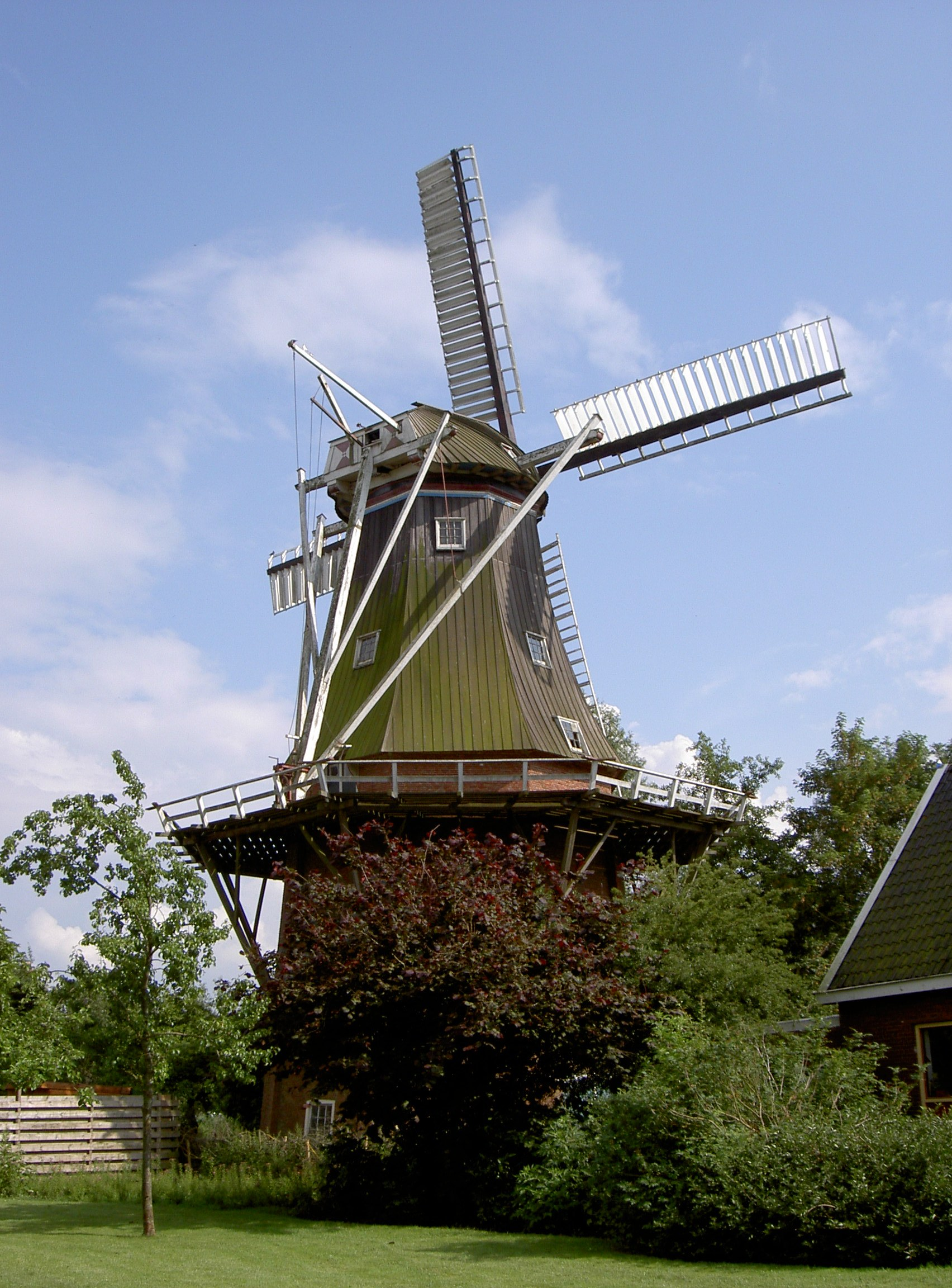 Een Koren en Pelmolen die gebouwd is in 1851 in Adorp